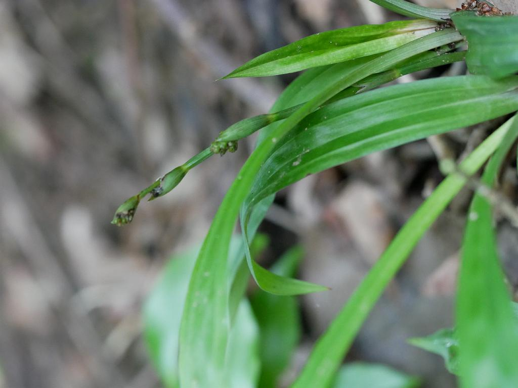 2019/06/10 岡山県：Okayama Pref. Japan